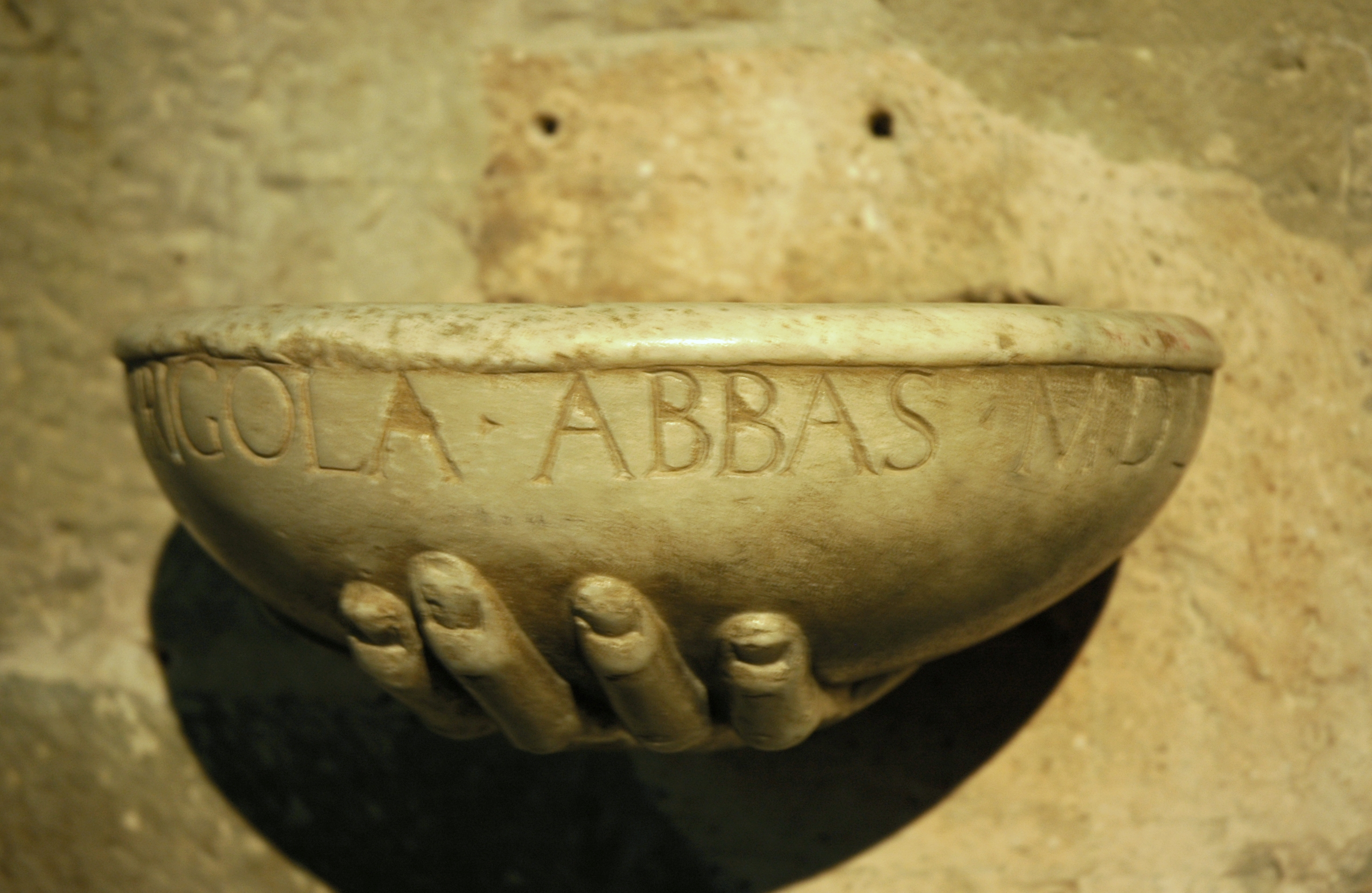 Sant Benet de Bages - Pica de Frigola